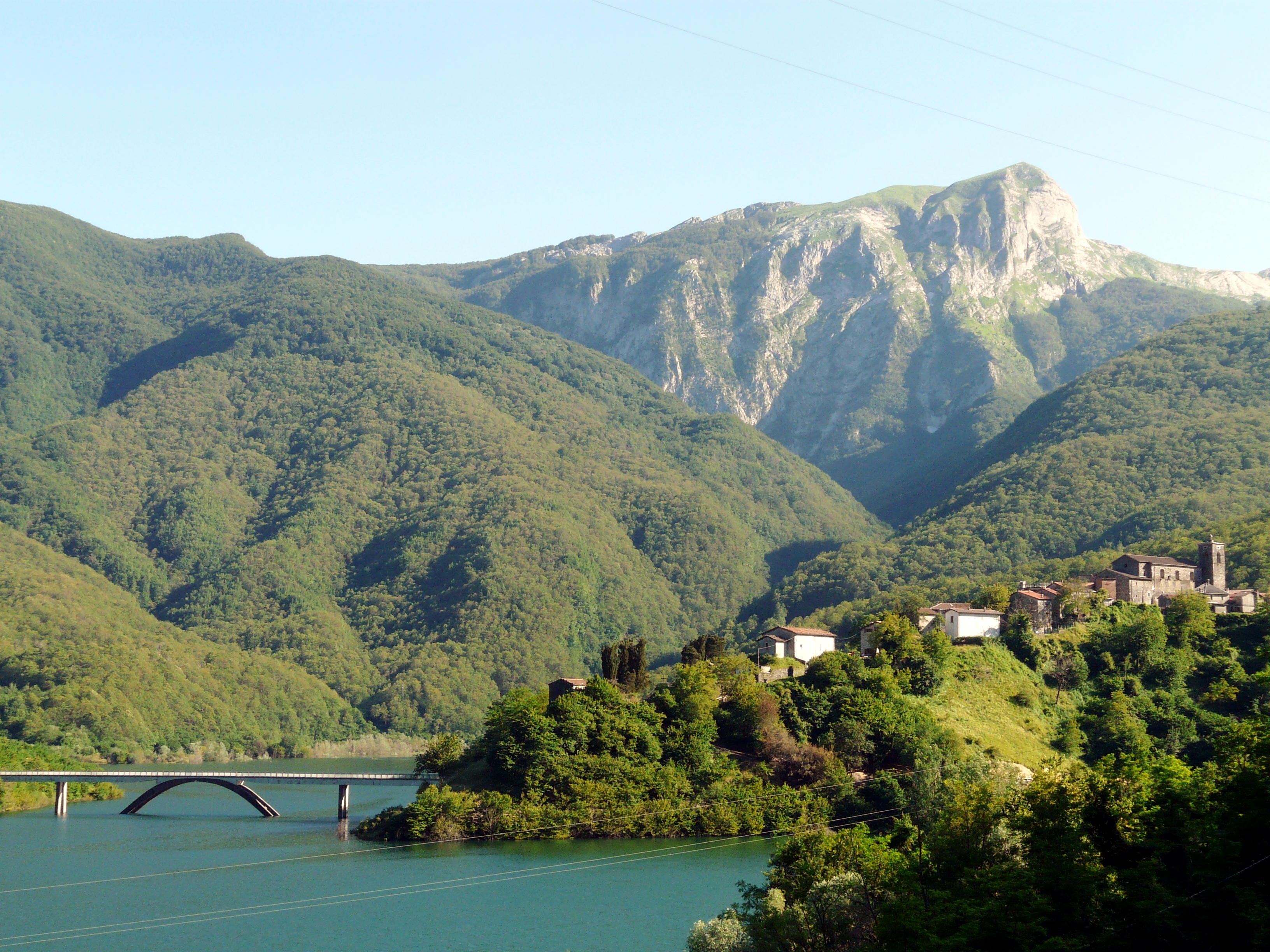 Panorama di Vagli Sotto, Ponte Morandi, Alpi Apuane, Toscana, Italia.